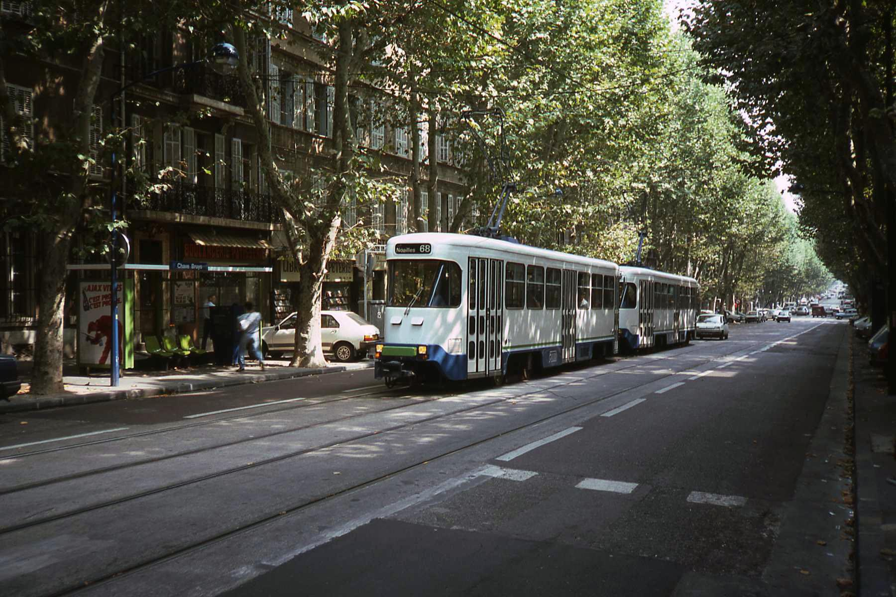 Tramway PCC sur le boulevard Chave en 1984 (ligne 68 fermée en janvier 2004)